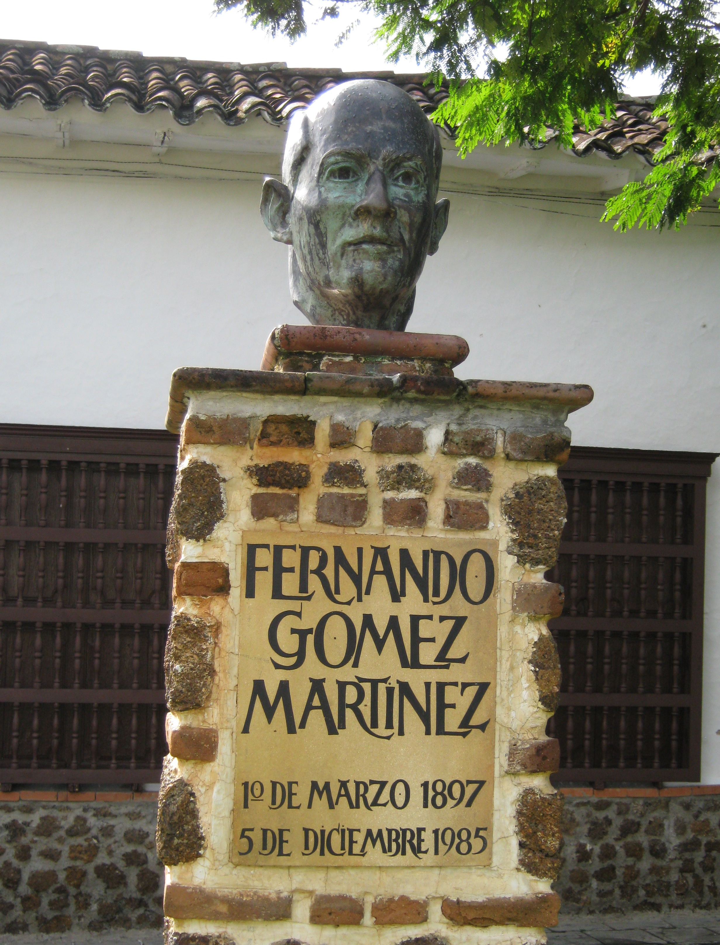 Busto de Fernando Gomez Martinez en Santa Fe de Antioquia. Colombia